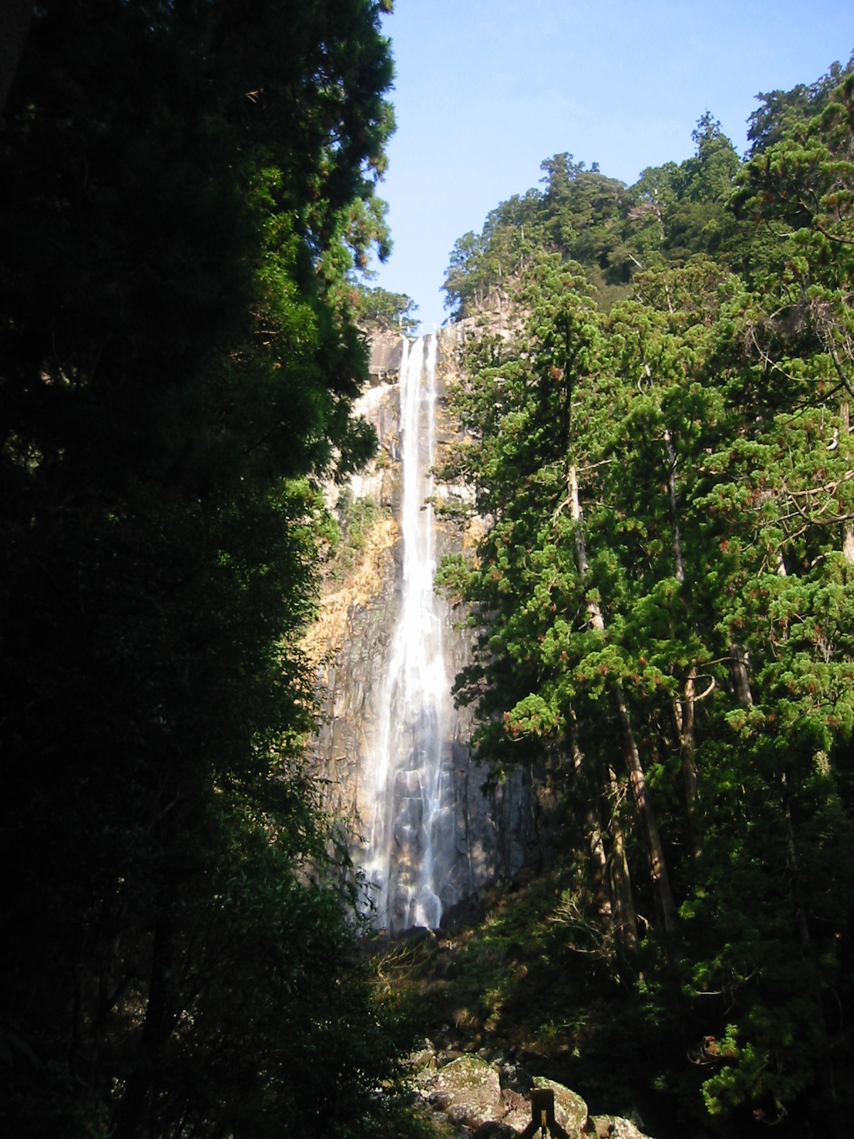 飛瀧神社